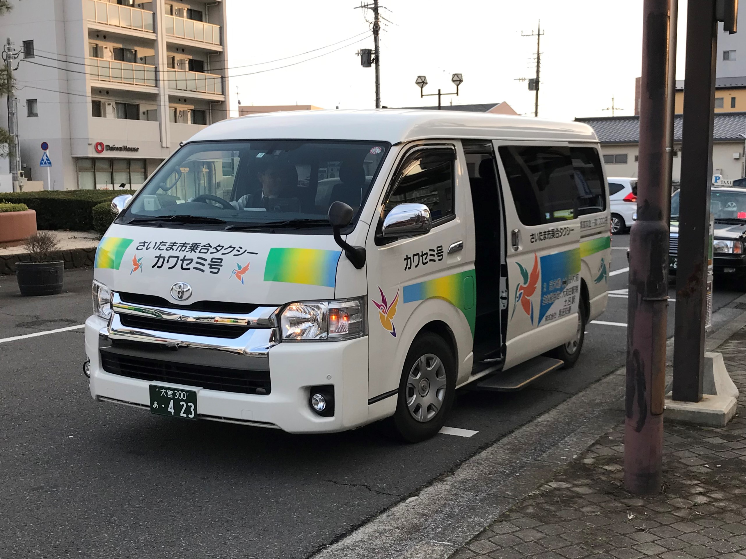 さいたま市見沼区片柳西地区乗合タクシー「カワセミ号」を撮影しました。